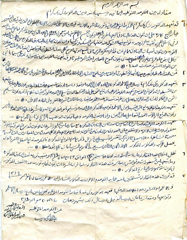 عقد تسليح بامضاء الإمام مع عبد الله العمري